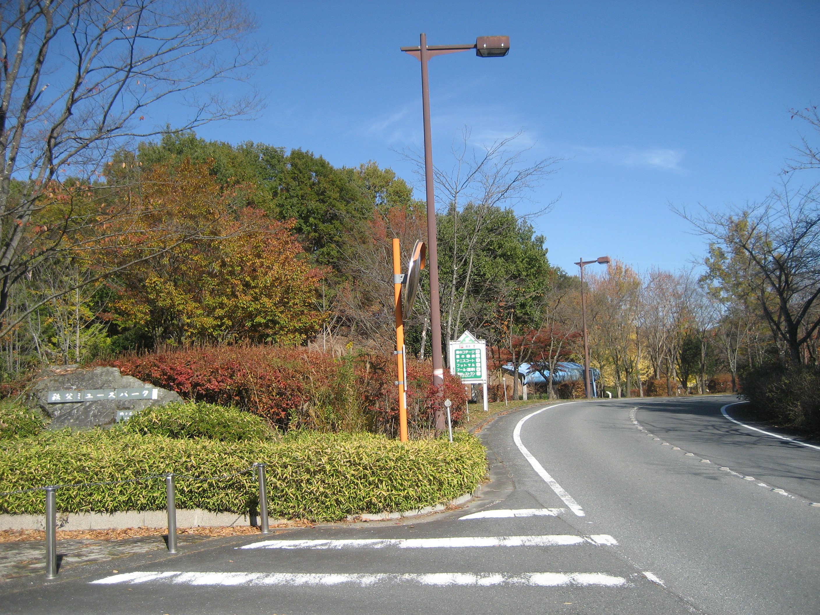 秩父ミューズパーク（公園南口付近を撮影）